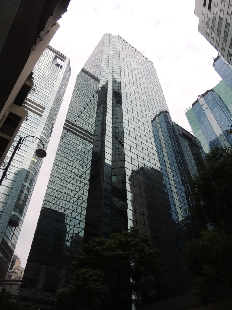 Sunning Plaza